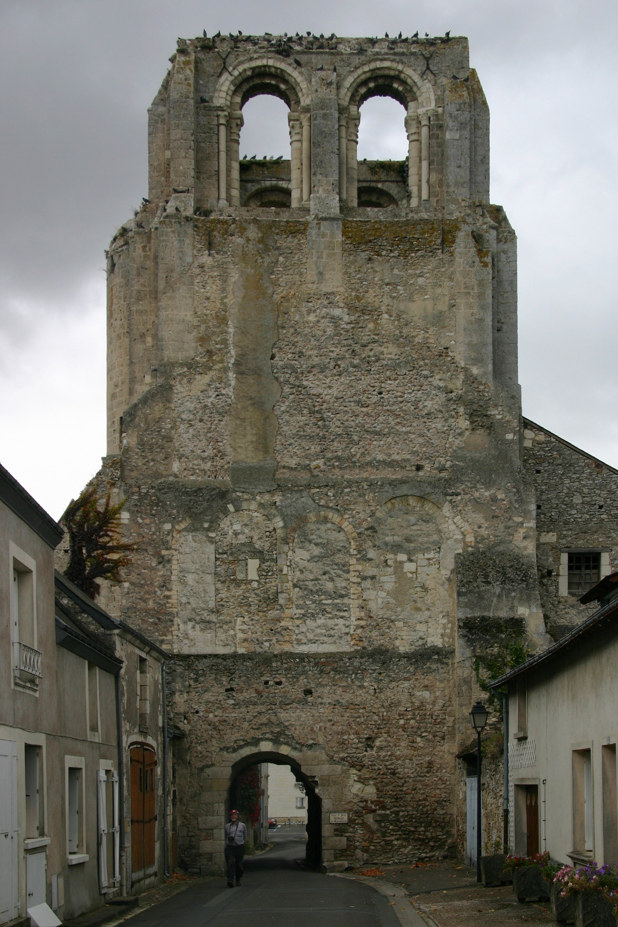 Cormery